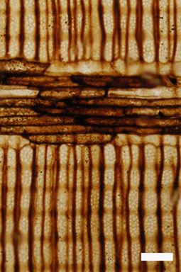 bois perminéralisé d'Archaeopteris (Callixylon) en coupe radiale. Echelle=0.1mm.